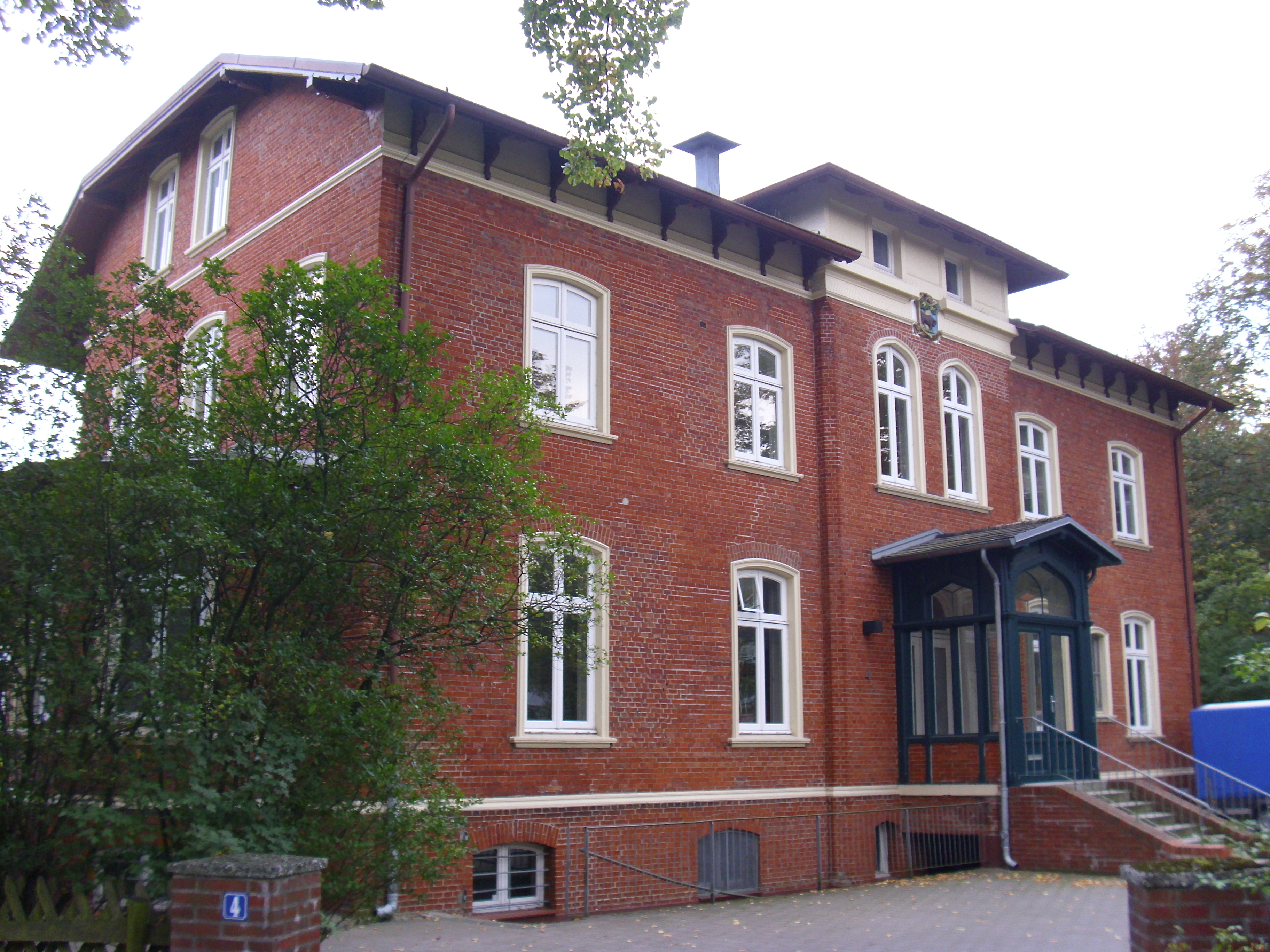 Bovestraße 4 This is a photograph of an architectural monument.